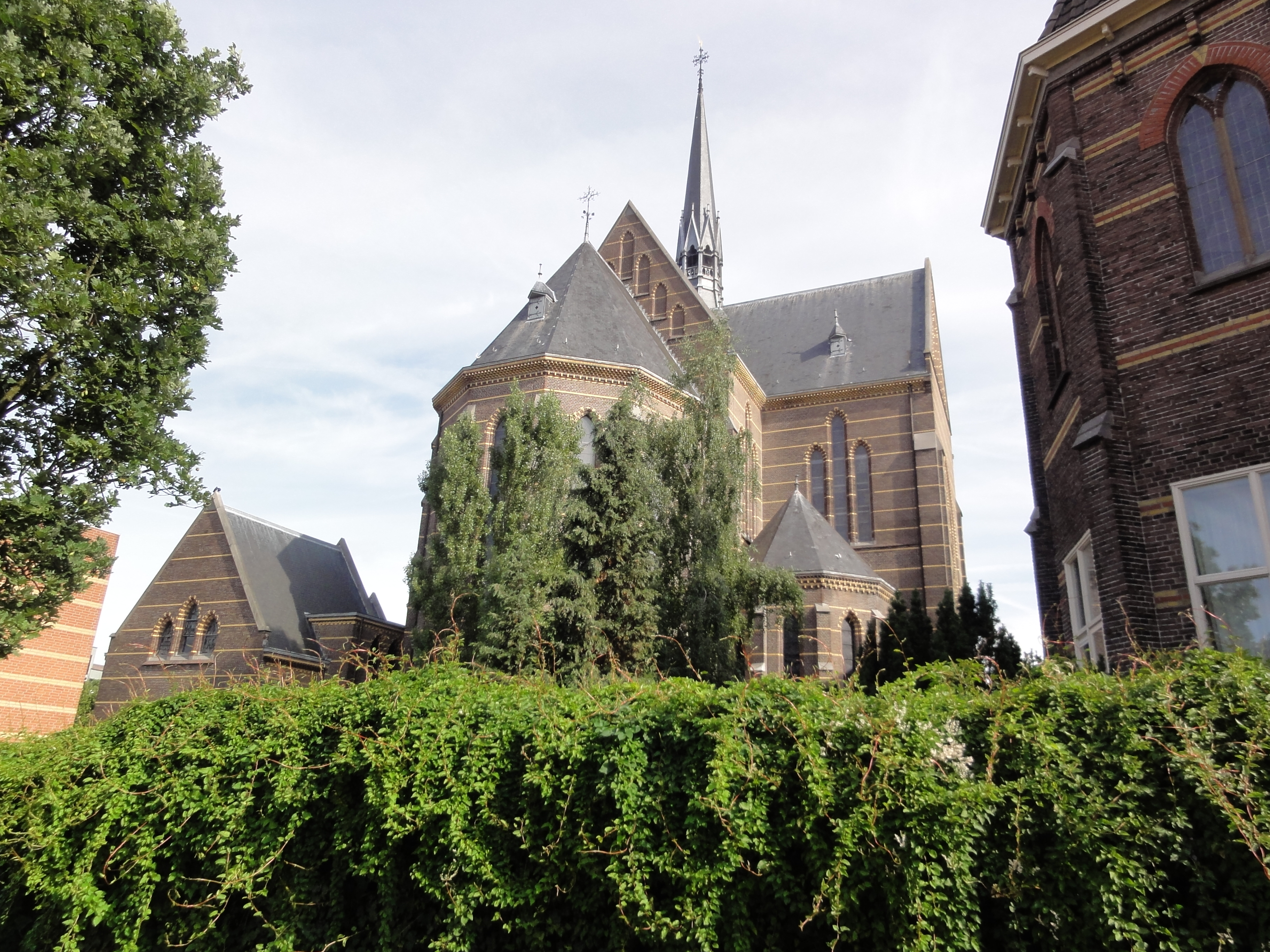 Nijmegen Rijksmonument 522947 kerk Berg en Dalseweg 42 achterzijde.